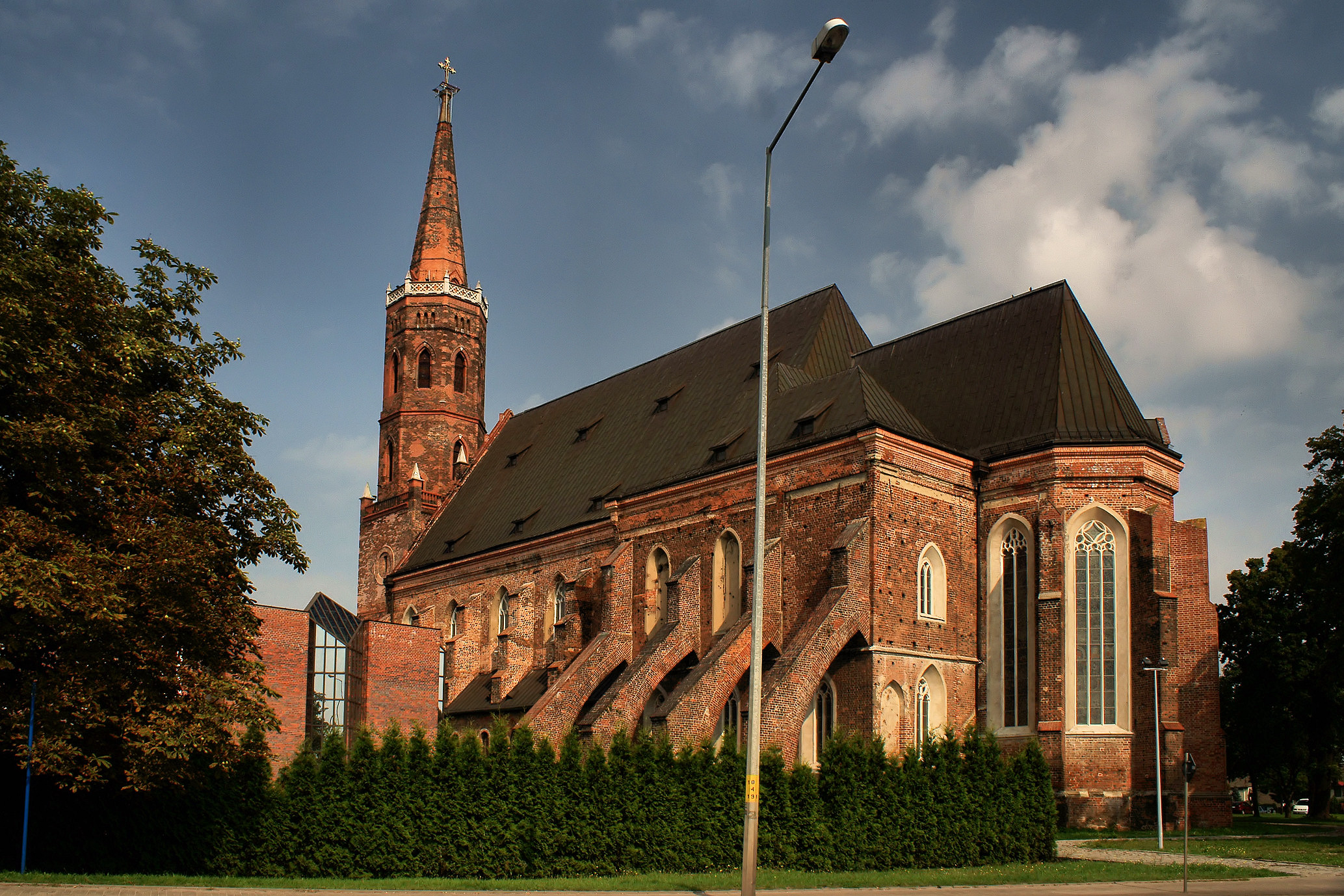 Kolegiata (katedra Panny Marii) Głogów, Plac Kolegiacki 1, Głogów